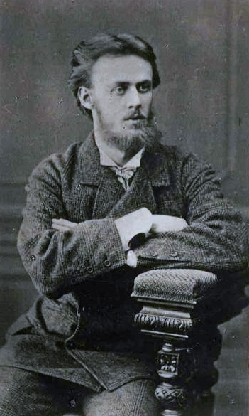 Фотография П. Н. Яблочкова в годы работы в Москве